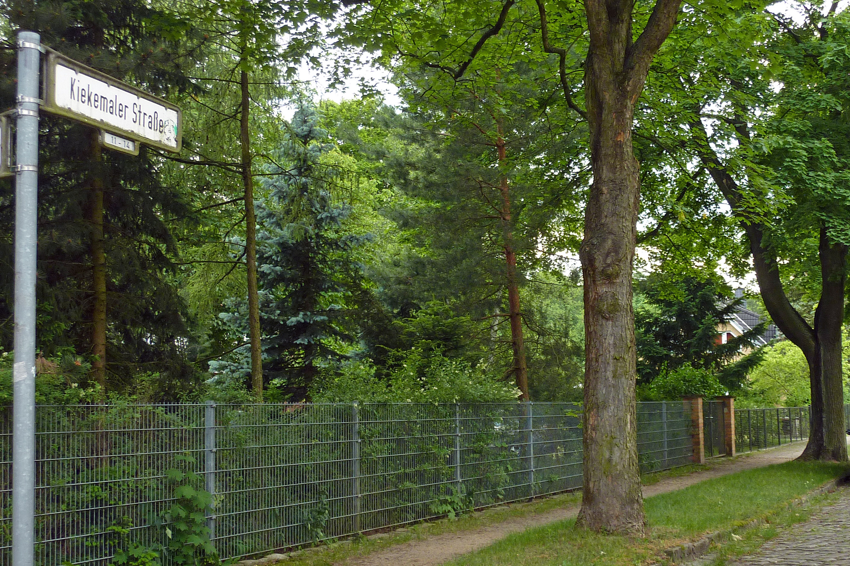 Kiekemaler Straße in Berlin-Mahlsdorf, in der Ortslage Kiekemal